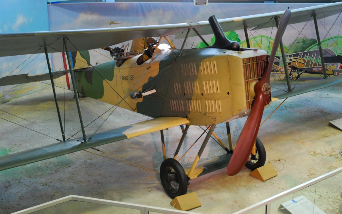 Breguet XIV preserved at Musée de l'Air et de l'Espace